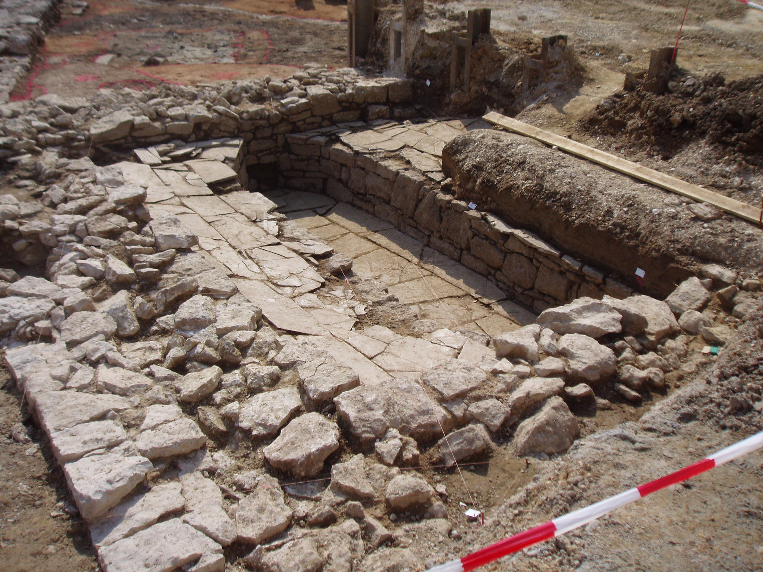 Ehemaliges_Dominikanerkloster_Eichstätt,_Großlatrine,_Grabung_2009